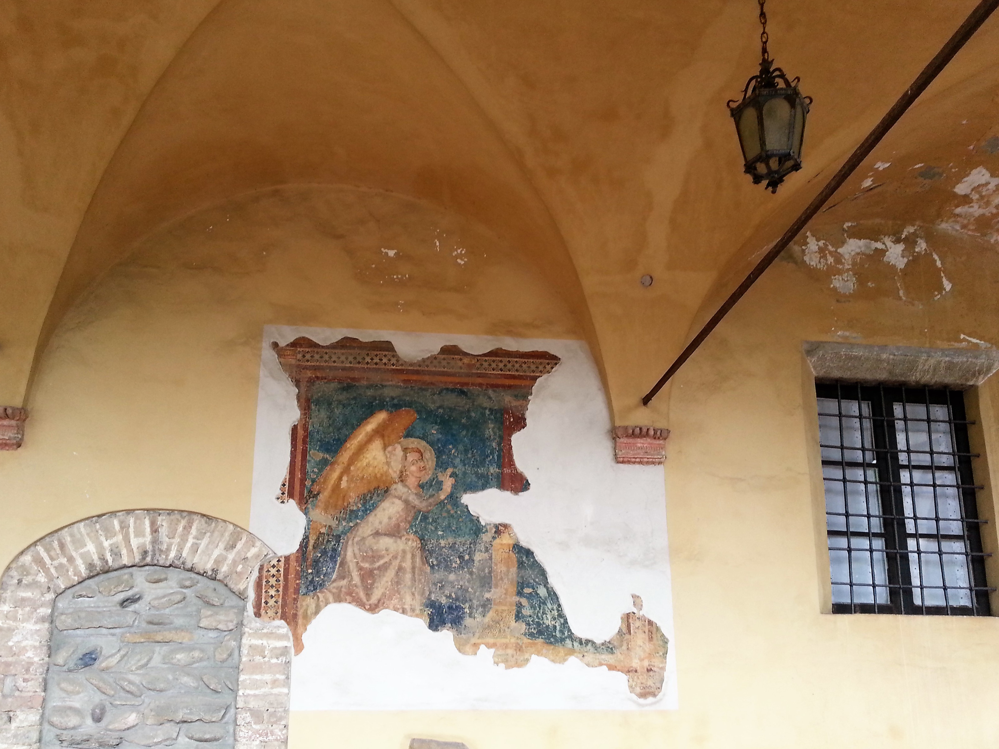 Affresco dell'Annunciazione sul chiostro della chiesa di Santa Maria Assunta in Torre boldone